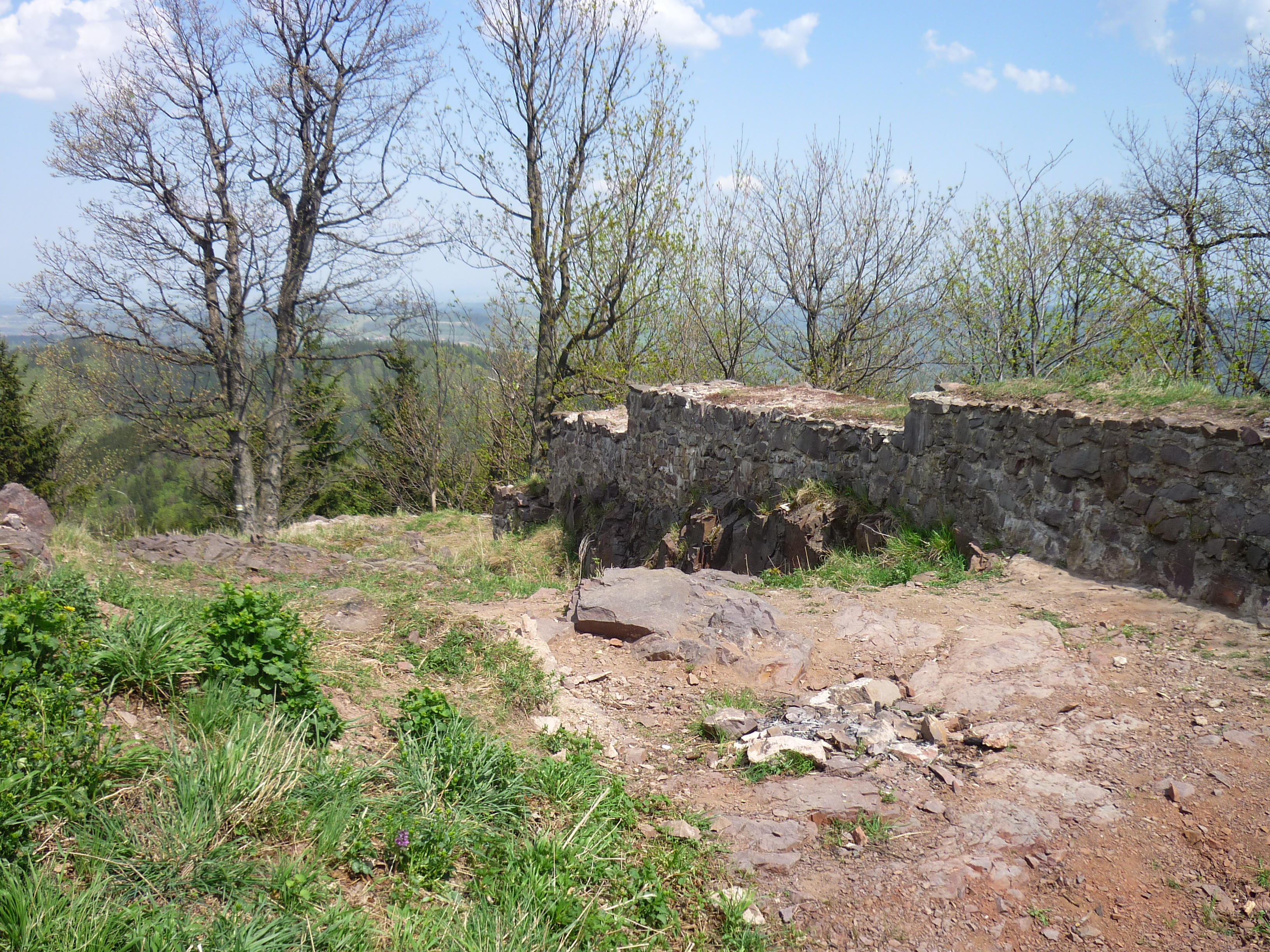 Rogowiec pozostałości muru